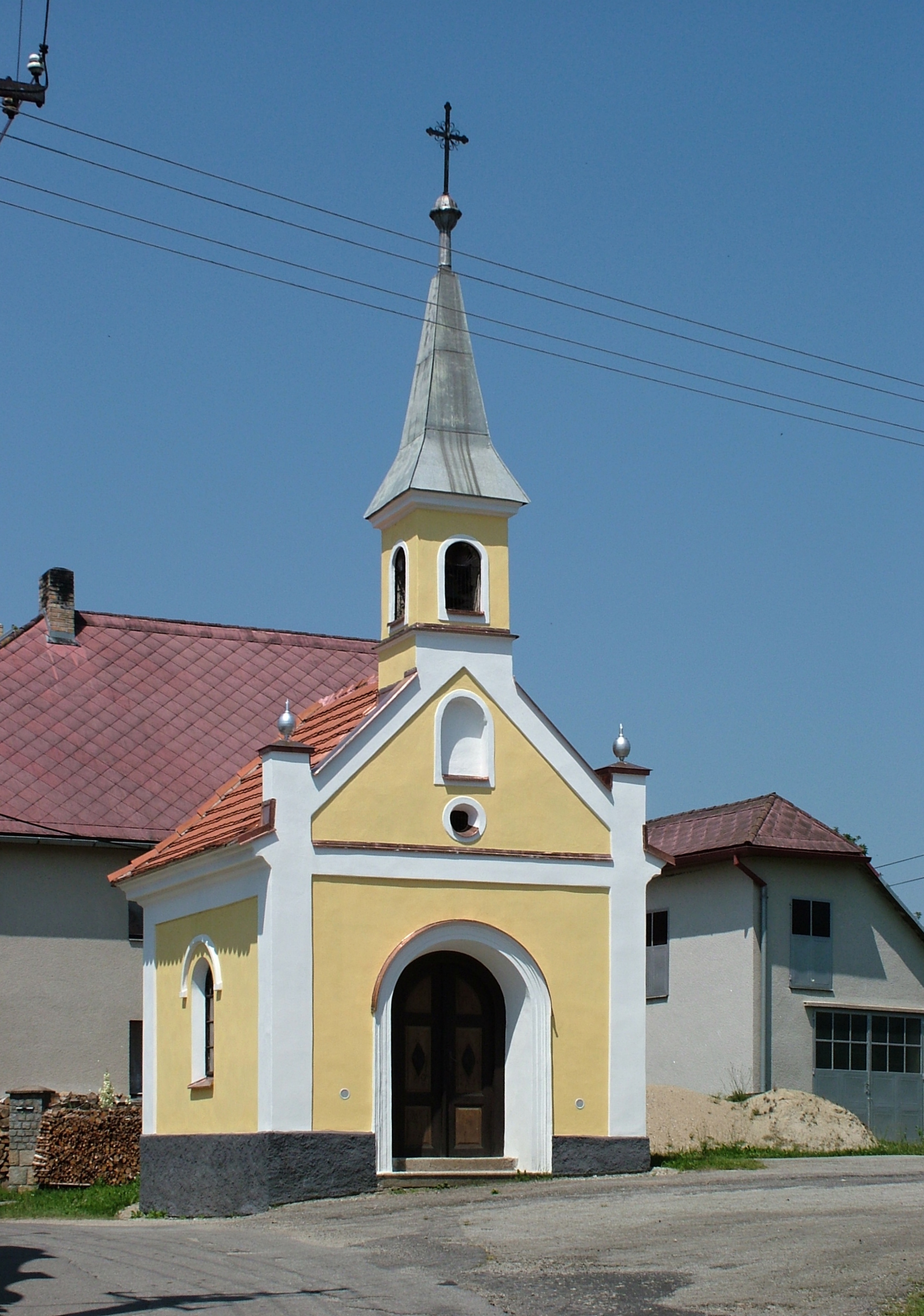 Návesní kaple Tvrzice